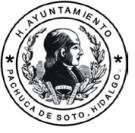 Sello o escudo del ayuntamiento de Pachuca de Soto.